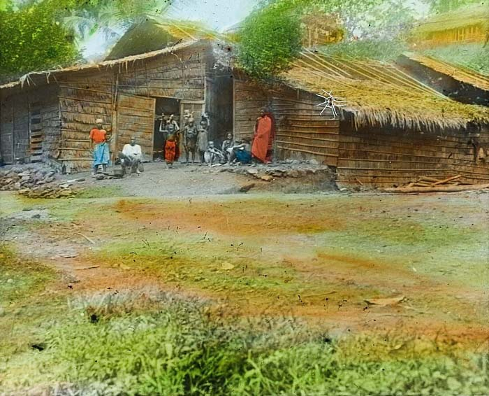 Dr. Albert Schweitzer stichtte in 1913 een ziekenhuis in Lambarené (Gabon) op het terrein van het Parijse zendingsgenootschap, gelegen aan de oever van de Ogowe rivier. De bamboehutten en raffiabladerdaken van het oude ziekenhuis eisten een voortdurend onderhoud. Na elke tornado moesten gaten in de daken worden gedicht en elke twee of drie jaar moest een dak opnieuw gedekt worden. Vaak kon de arts zich 's ochtends alleen aan de patiënten wijden, omdat hij 's middags gebouwen moest herstellen. Wegens het gebrek aan ruimte besloot Schweitzer in 1925 een nieuw ziekenhuis te bouwen, 3 kilometer stroomopwaarts van het oude ziekenhuis. De gebouwen van het nieuwe ziekenhuis werden gebouwd met daken van golfplaten. In 1927 waren voldoende gebouwen van het nieuwe ziekenhuis gereed, zodat de zieken konden worden overgebracht. De barakken van het oude ziekenhuis werden ontruimd, waarna het materiaal kon worden gebruikt om het nieuwe ziekenhuis af te werken.